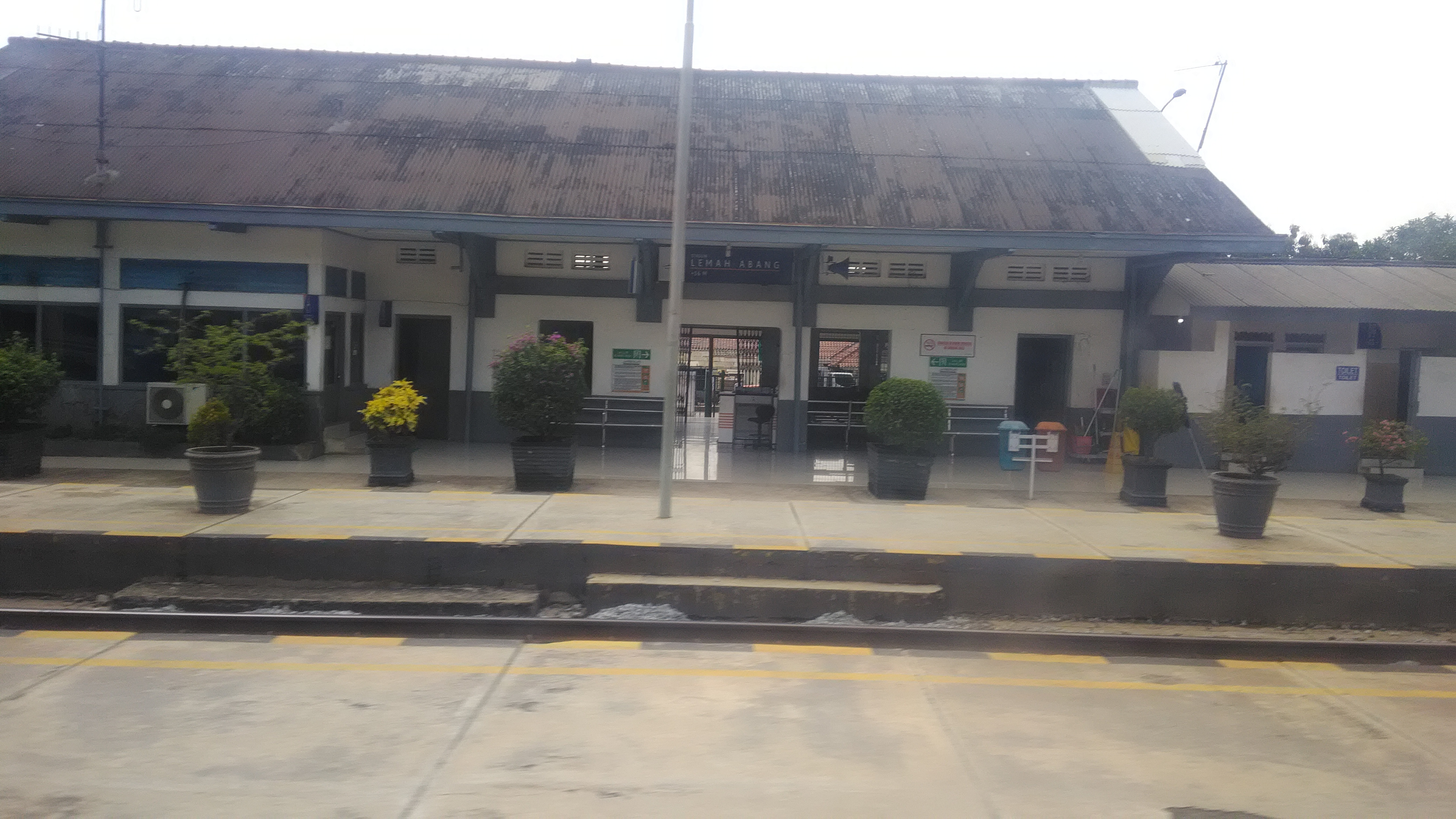 Stasiun Lemahabang 2019